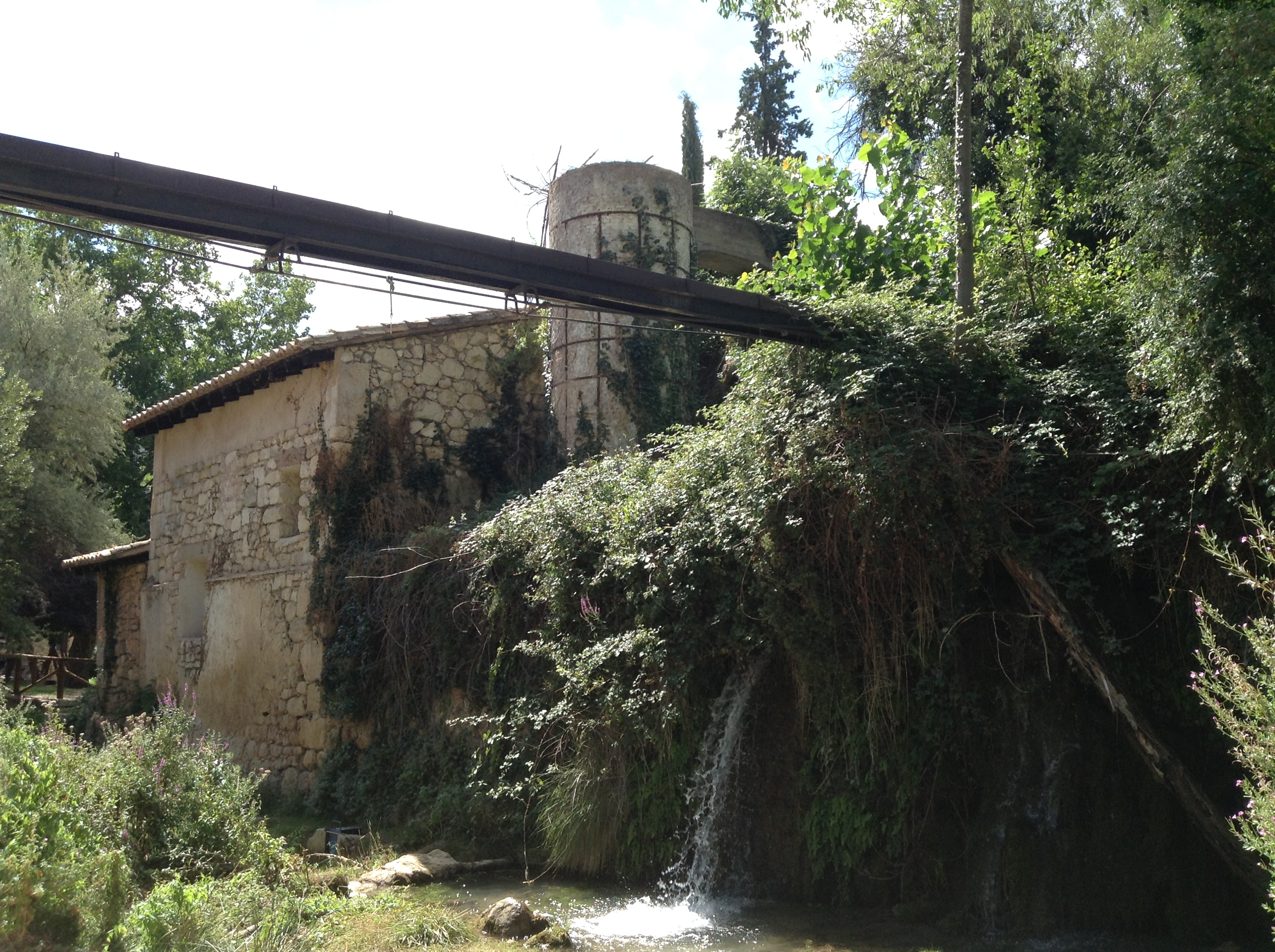 Molí de la Vila d'Ademús, documentat el segle XIII